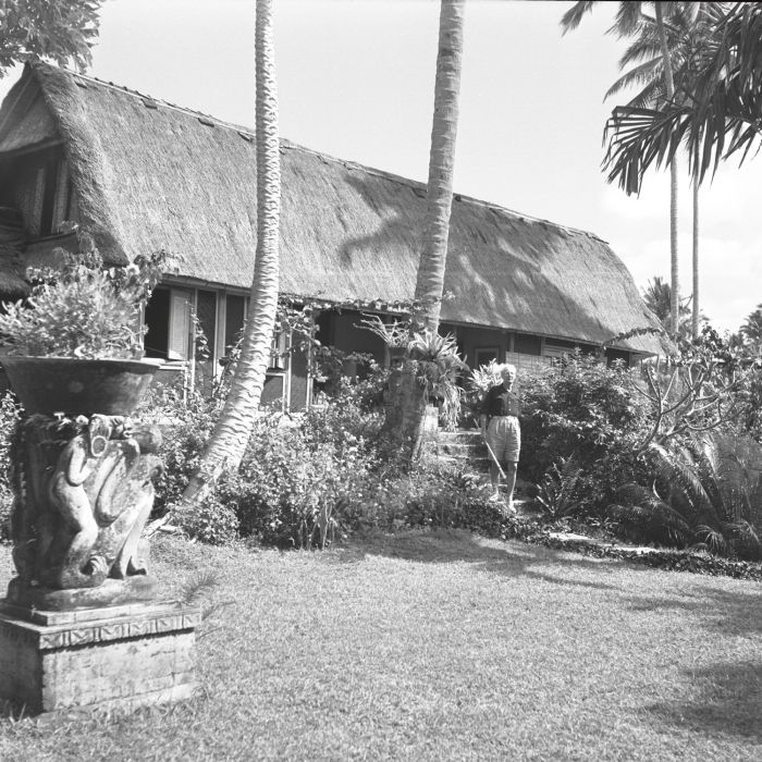 negatief. Rudolf Bonnet voor zijn huis